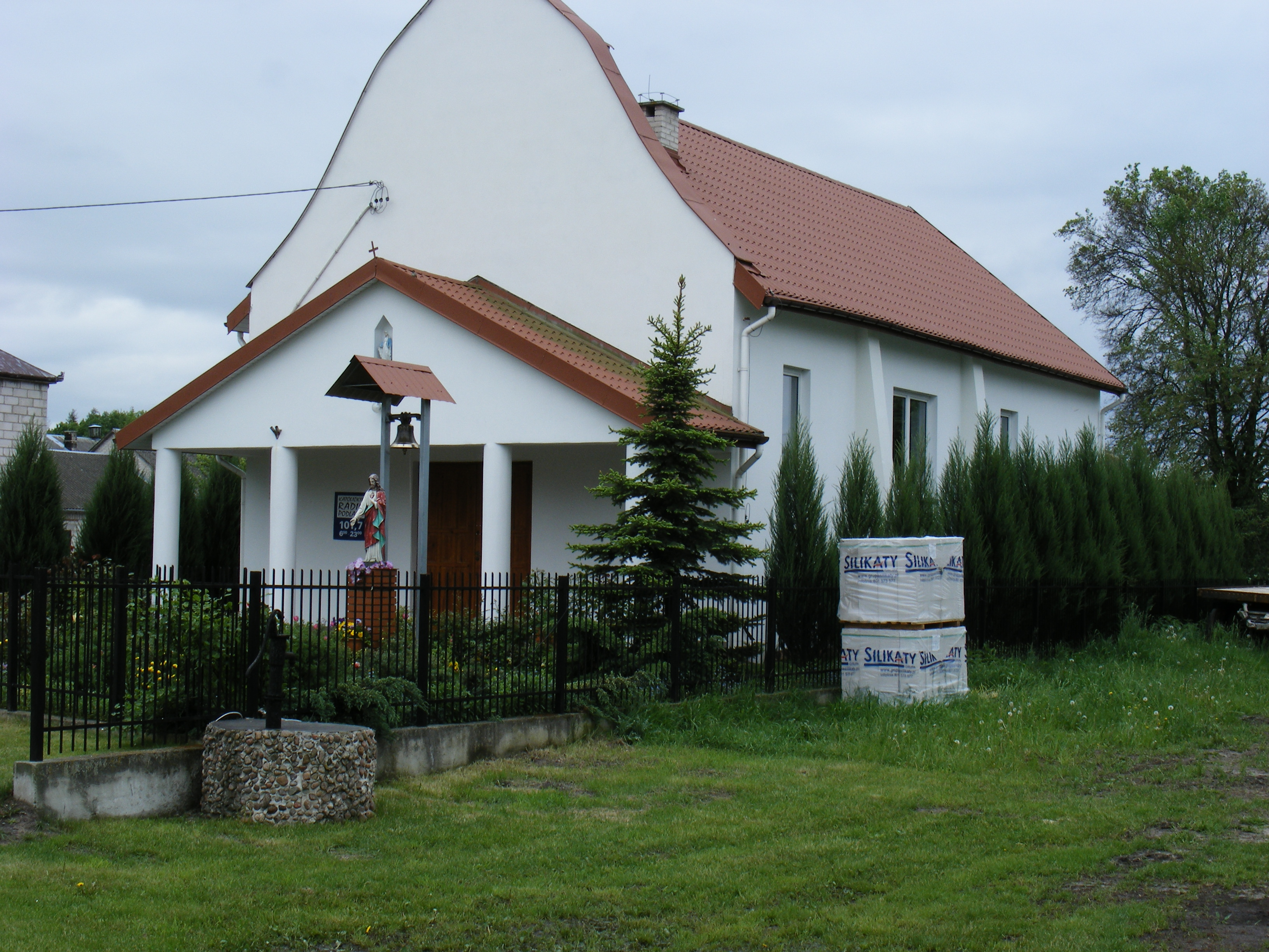 Widok na wiejską kaplicę w Wólce Konopnej